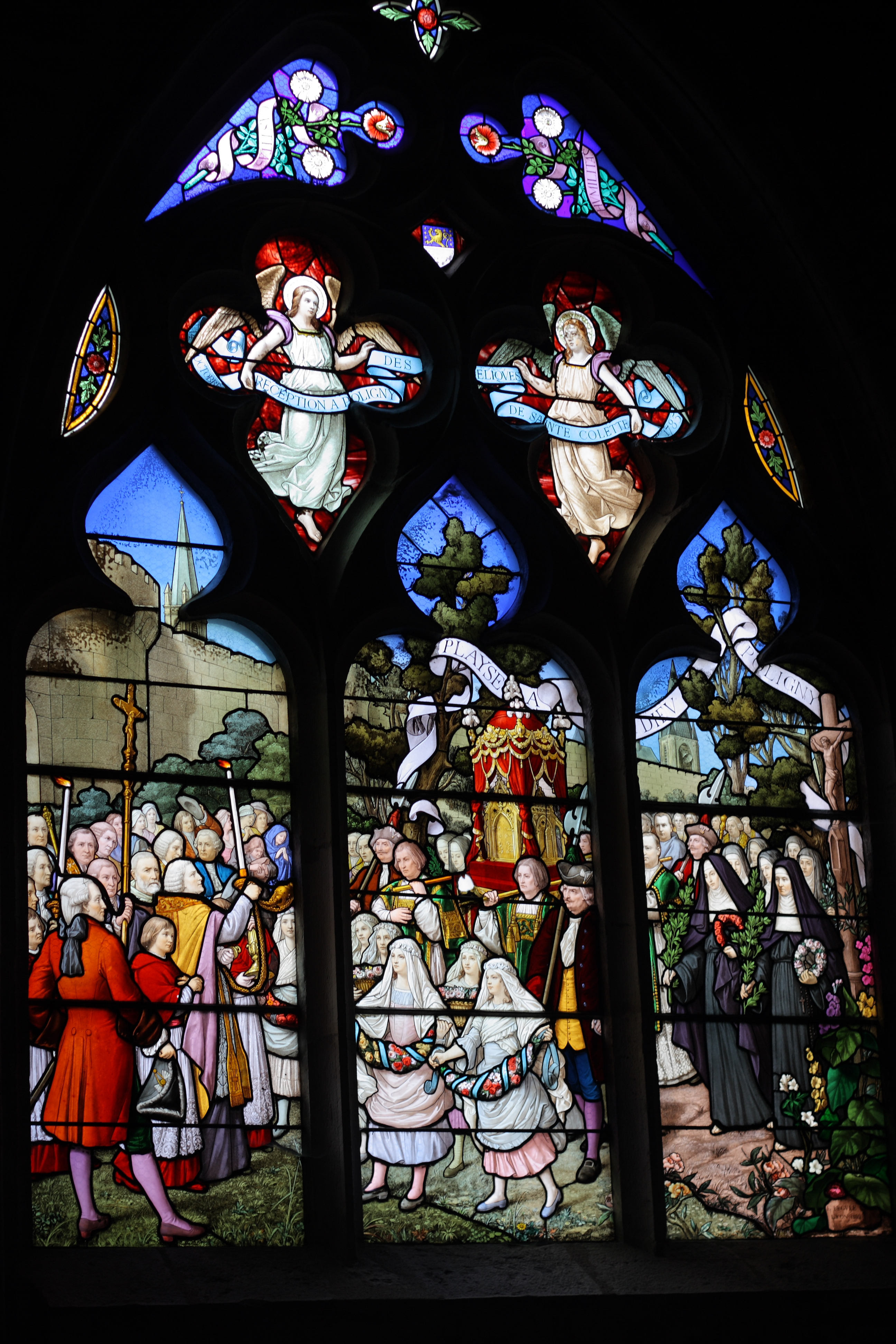 Bleiglasfenster in der katholischen Kirche: Collégiale Saint-Hippolyte in Poligny, Darstellung: Überführung der Reliquien der hl. Colette nach Poligny